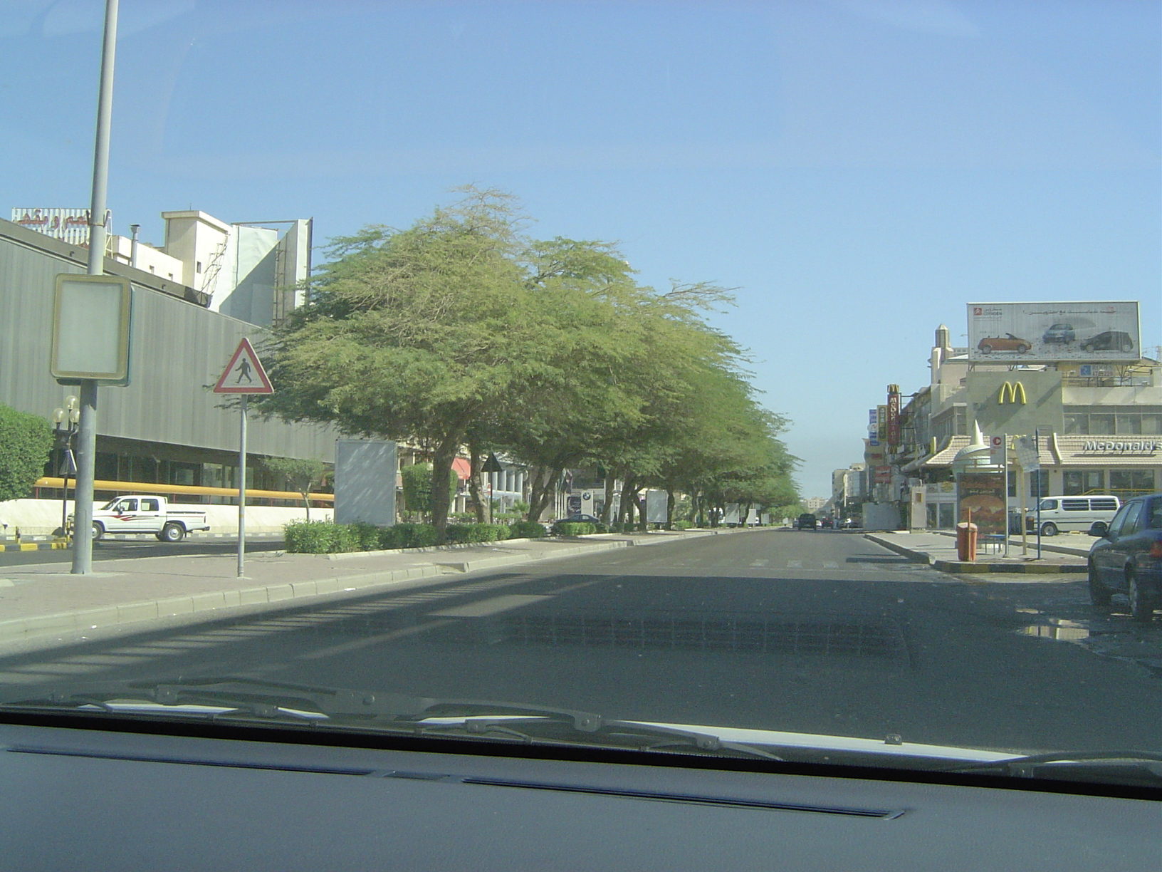 IN KUWAIT